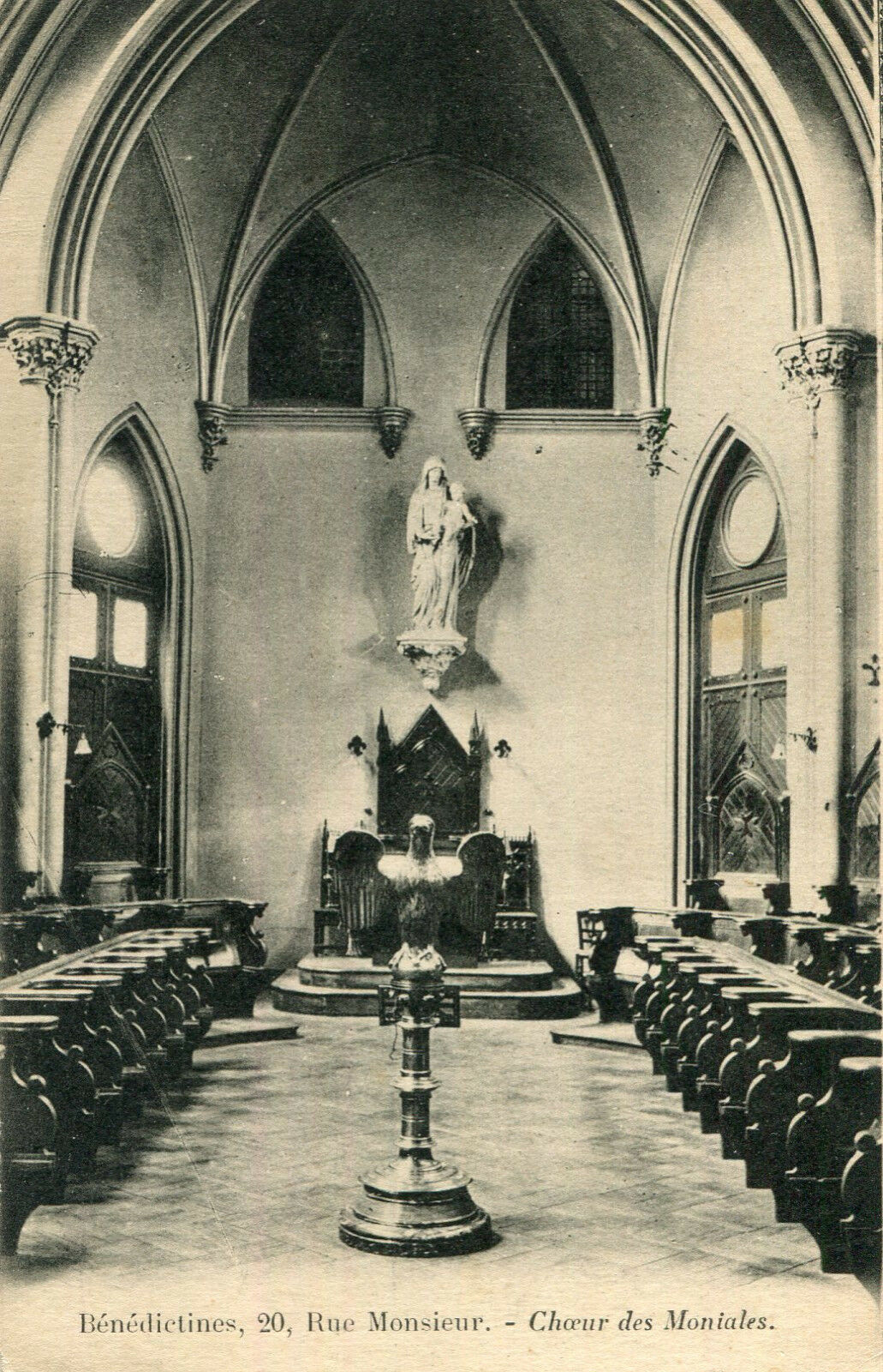 Chapelle des bénédictines de la rue Monsieur. Chœur des moniales. Carte postale ancienne.